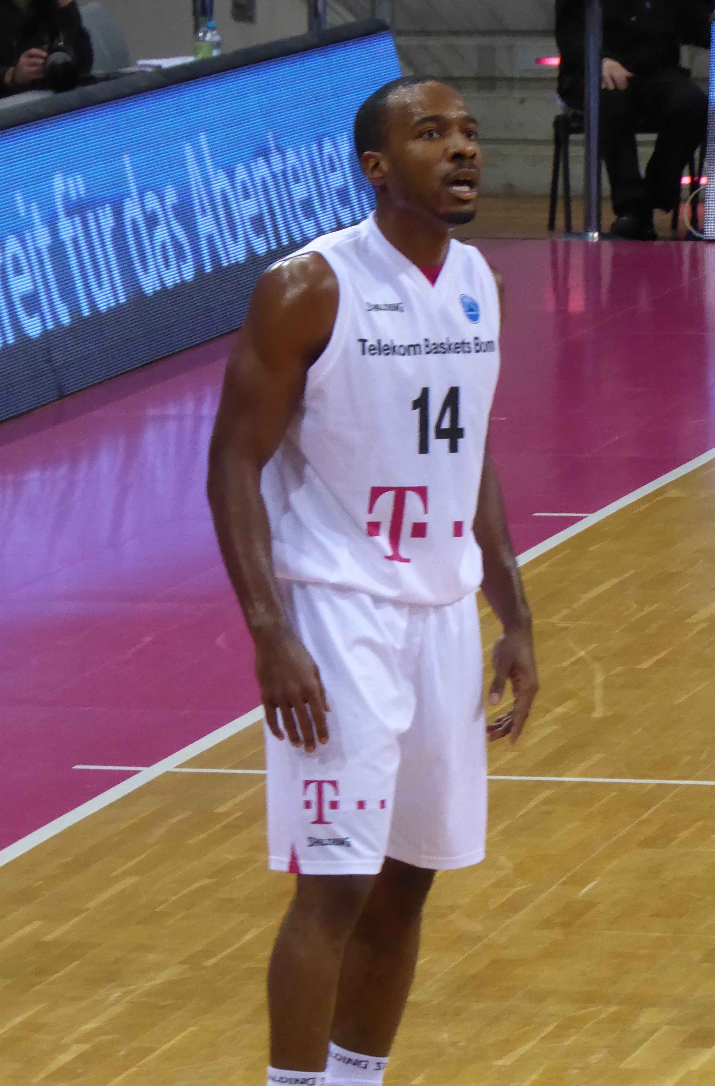 Josh Mayo beim Spiel der Telekom Baskets Bonn gegen APOEL Nicosia am 14. Dezember 2016.